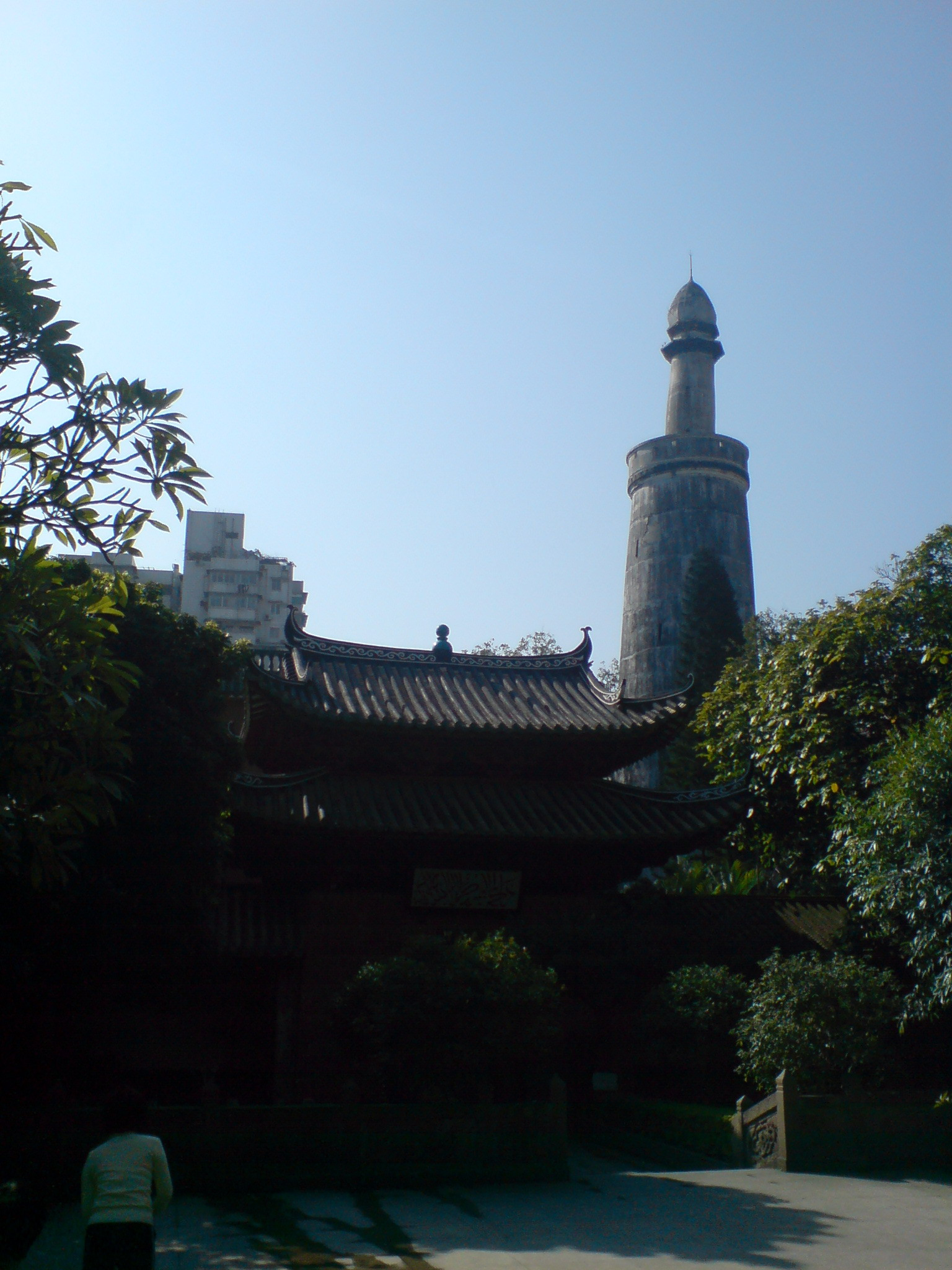 怀圣寺内看光塔